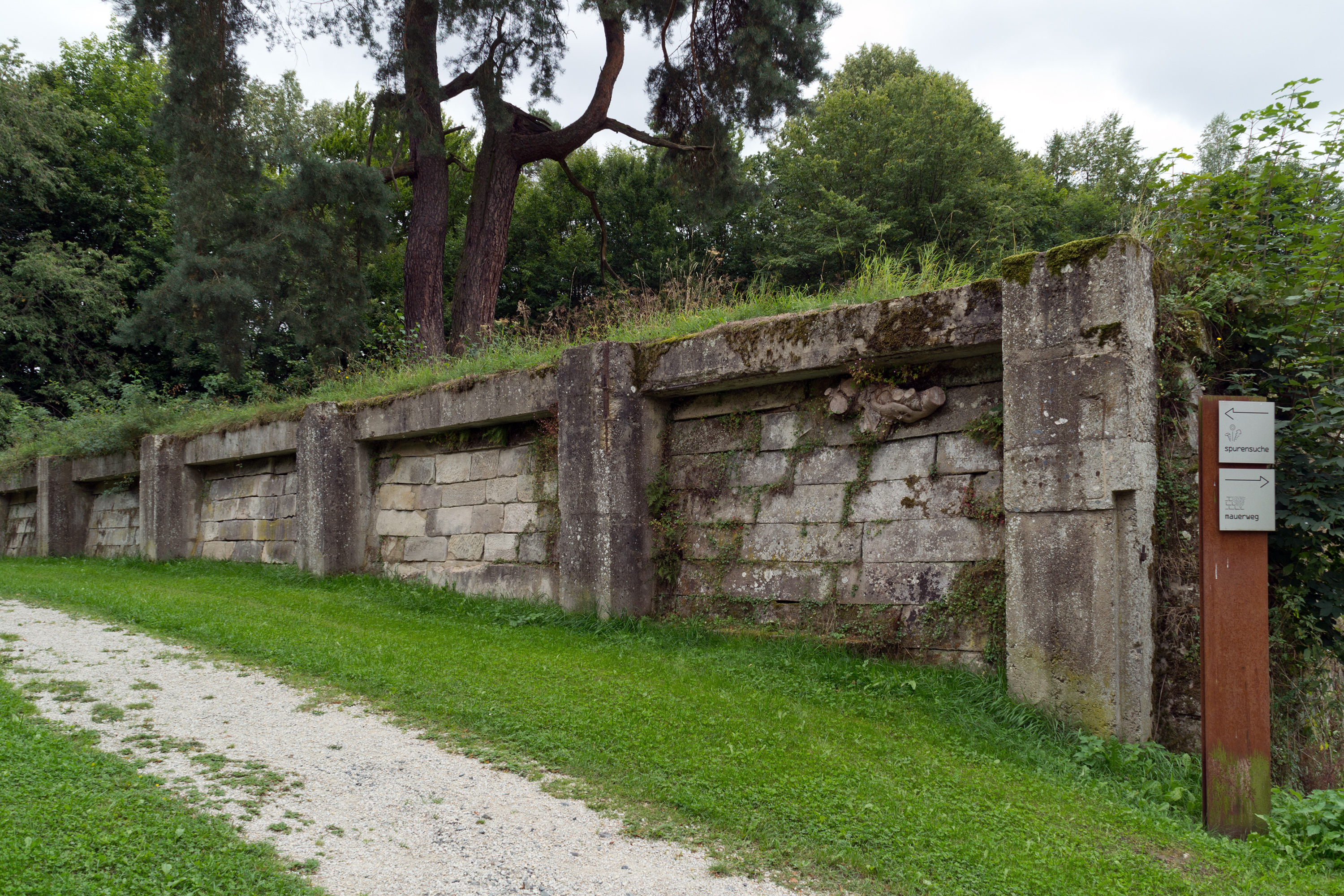 Gegen Ende des Zweiten Weltkriegs wurden zwischen der Contregarde Carl und dem Waffenplatz Philipp, zwei Vorwerken der Festung Rosenberg in Kronach, Betonarbeiten durchgeführt, um dort Produktionsanlagen für die Fertigung von Teilen des Düsenjägers Messerschmitt Me 163 zu errichten. Die Anlagen wurden jedoch nie fertiggestellt und in Betrieb genommen. Das Bild zeigt die heute noch sichtbaren Überreste der durchgeführten Arbeiten an der Nordseite des Waffenplatzes.